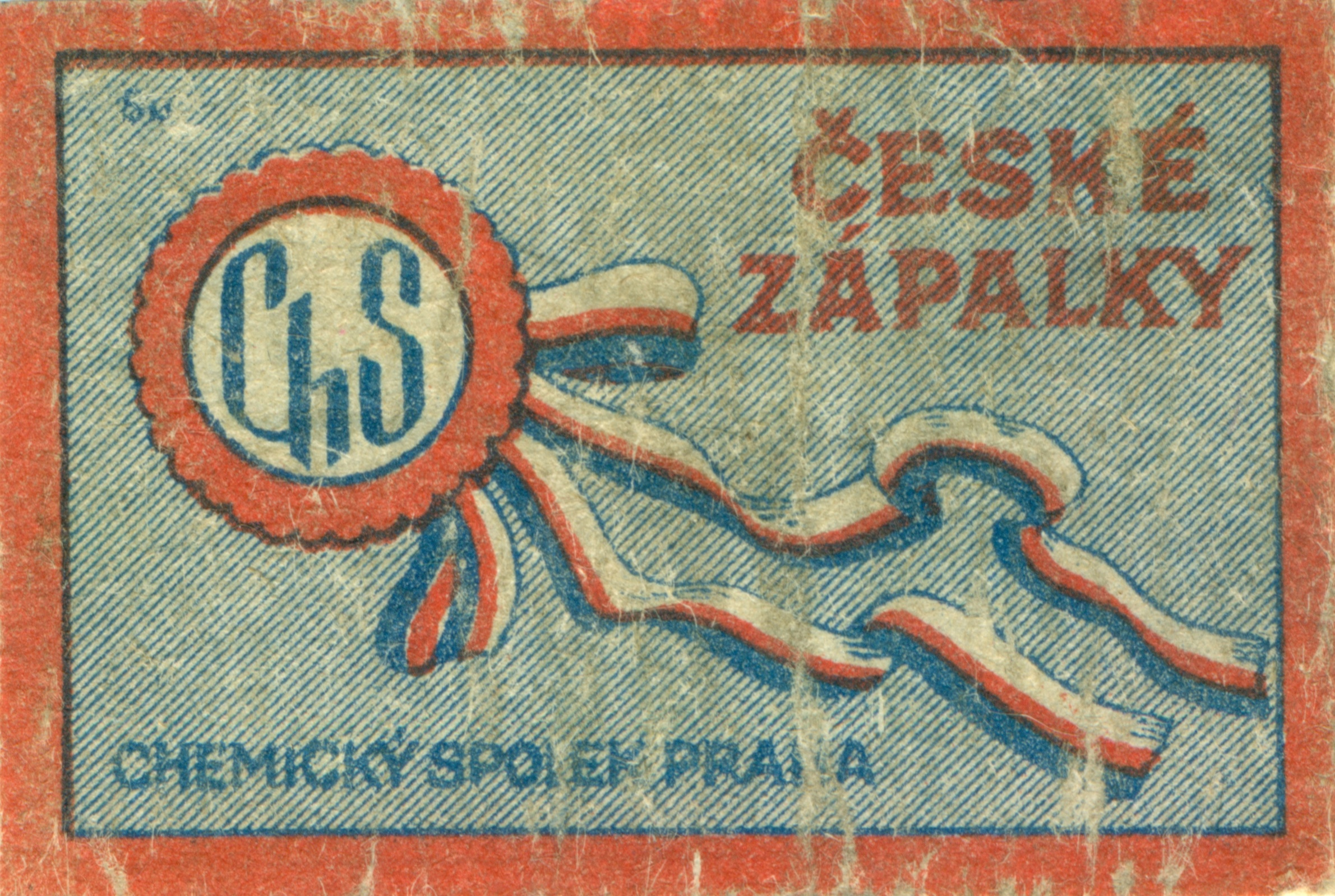 první nálepky